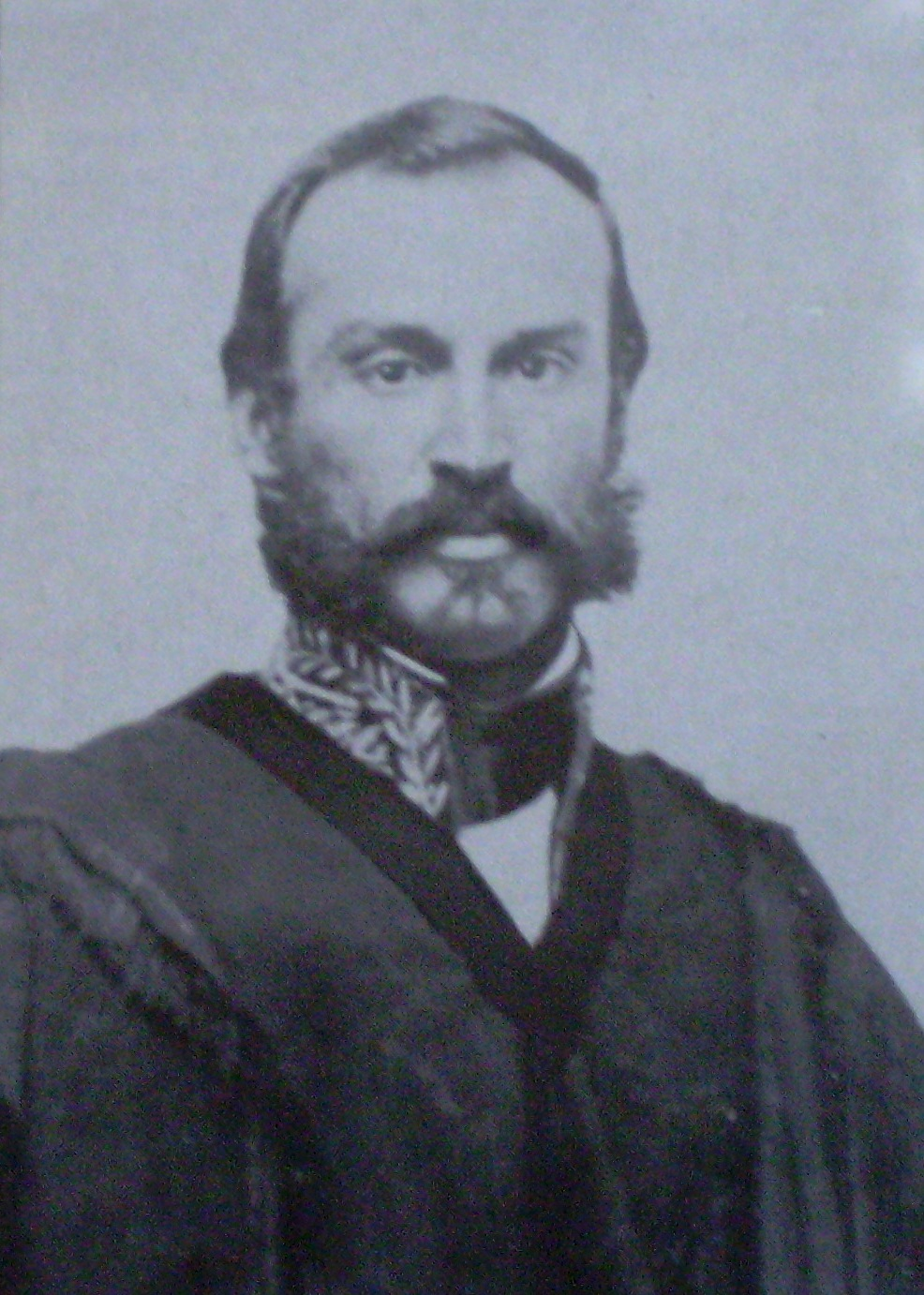 Ricardo López Jordán hijo